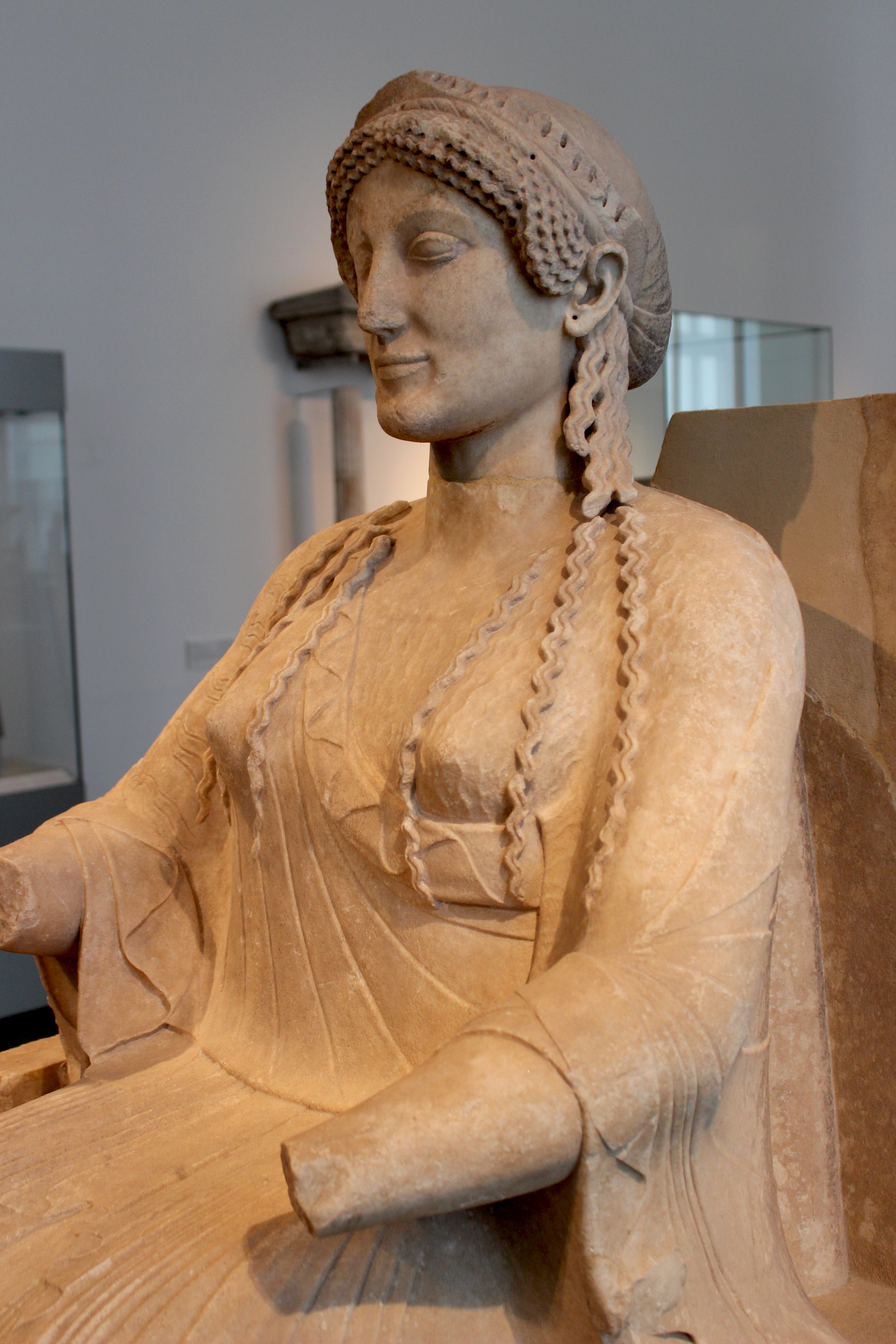 Altes Museum. Diosa de Tarento.